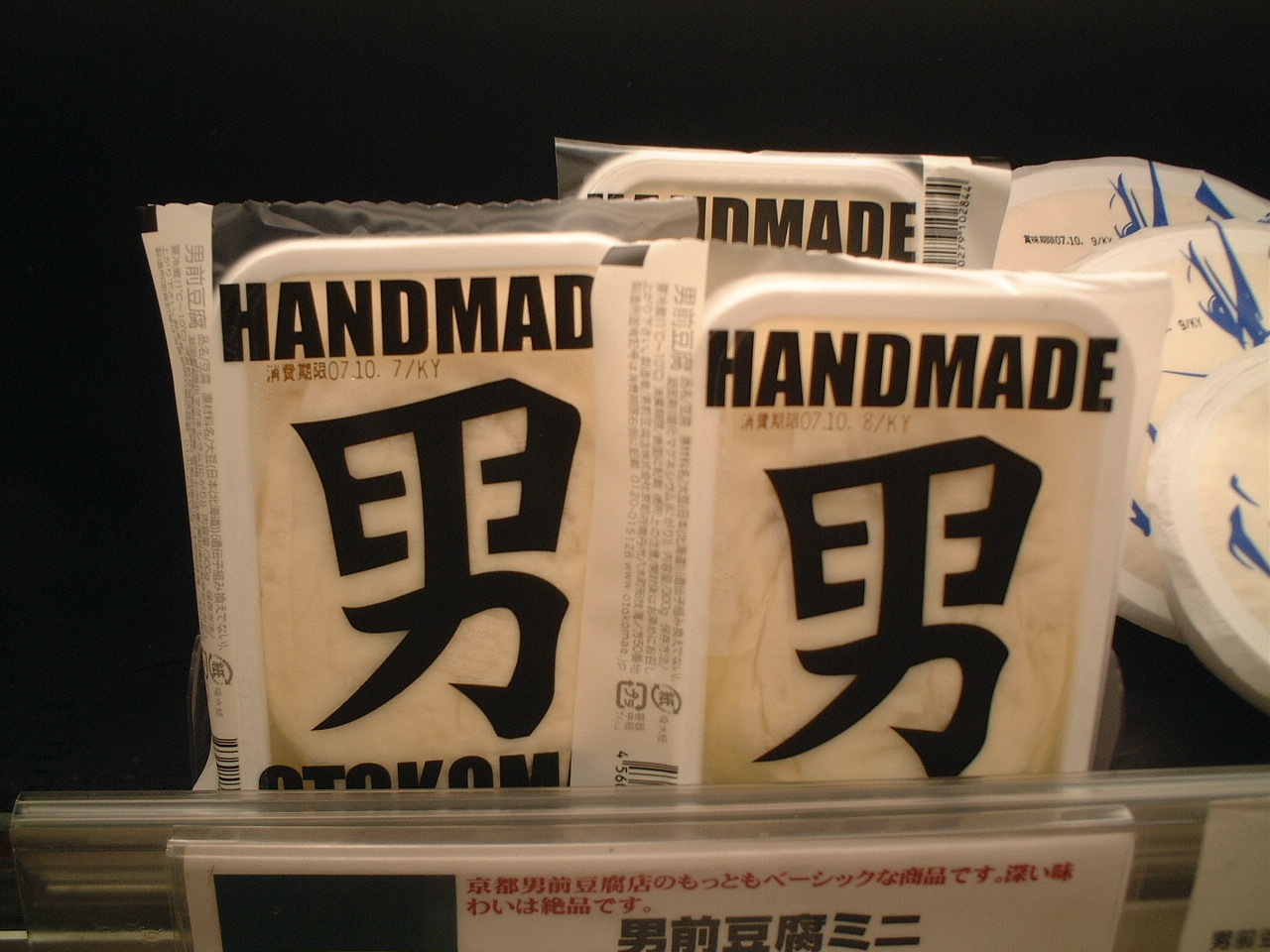 男前豆腐店の豆腐 (Tofu